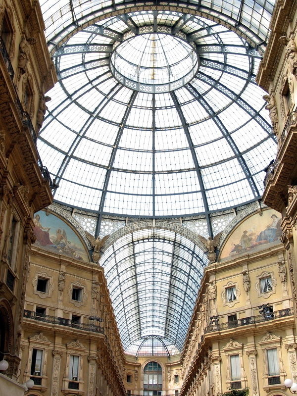 Milano Galleria Vittorio Emanuele II.